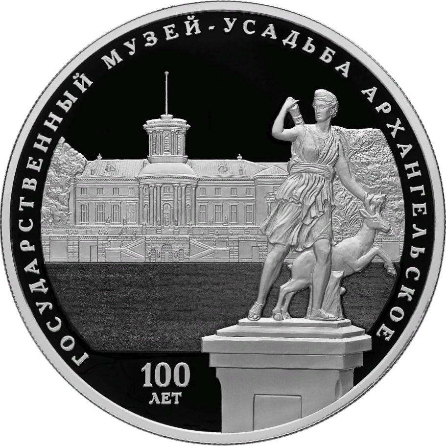 Монета Банка России, 100-летие основания Государственного музея-усадьбы «Архангельское»: скульптура «Артемида с ланью». 25 рублей, серебро, реверс, пруф. Изображение южного фасада дворца и парковой скульптуры «Артемида с ланью»; надписи — вдоль канта: «ГОСУДАРСТВЕННЫЙ МУЗЕЙ-УСАДЬБА АРХАНГЕЛЬСКОЕ», внизу слева: «100 ЛЕТ». Чеканка — Санкт-Петербургский монетный двор. Художник: Е.В. Крамская. Скульптор: А.Н. Бессонов.